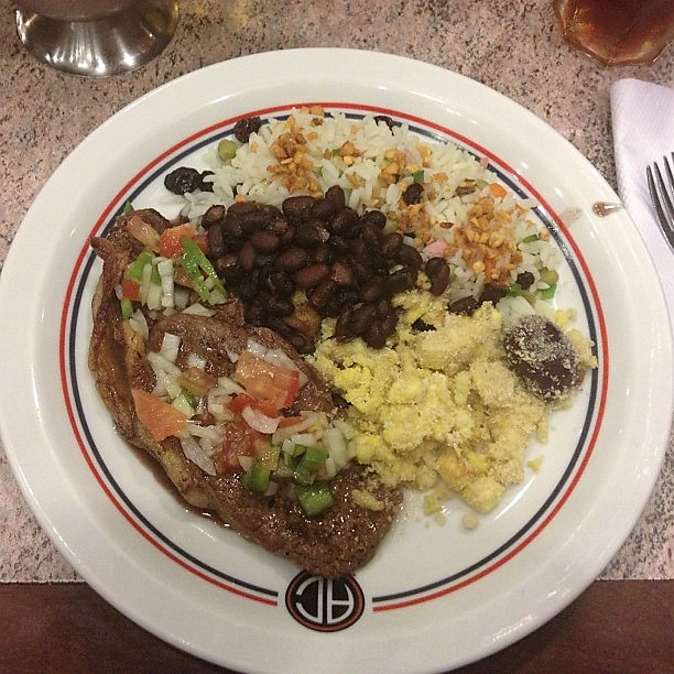 Comida brasileira: arroz a grega, feijão, farofa de ovos e picanha.